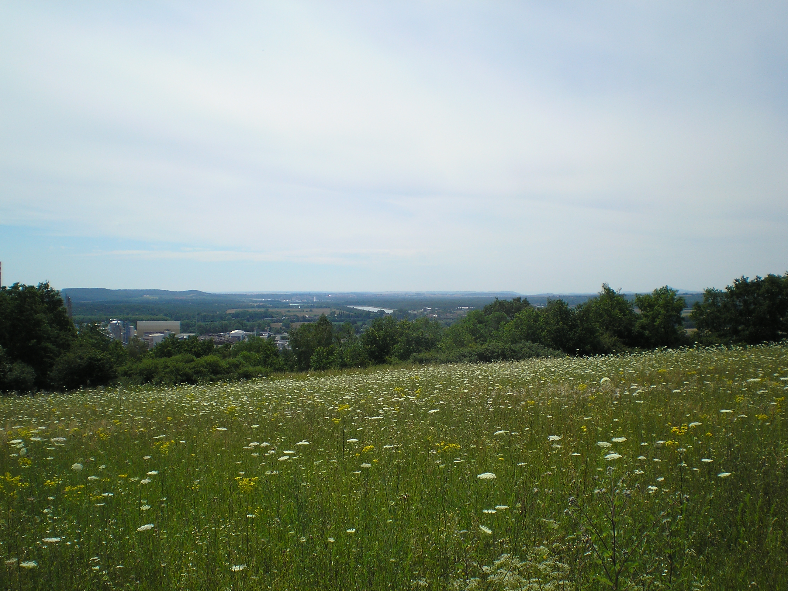 Přírodní památka Bílé stráně u Štětí